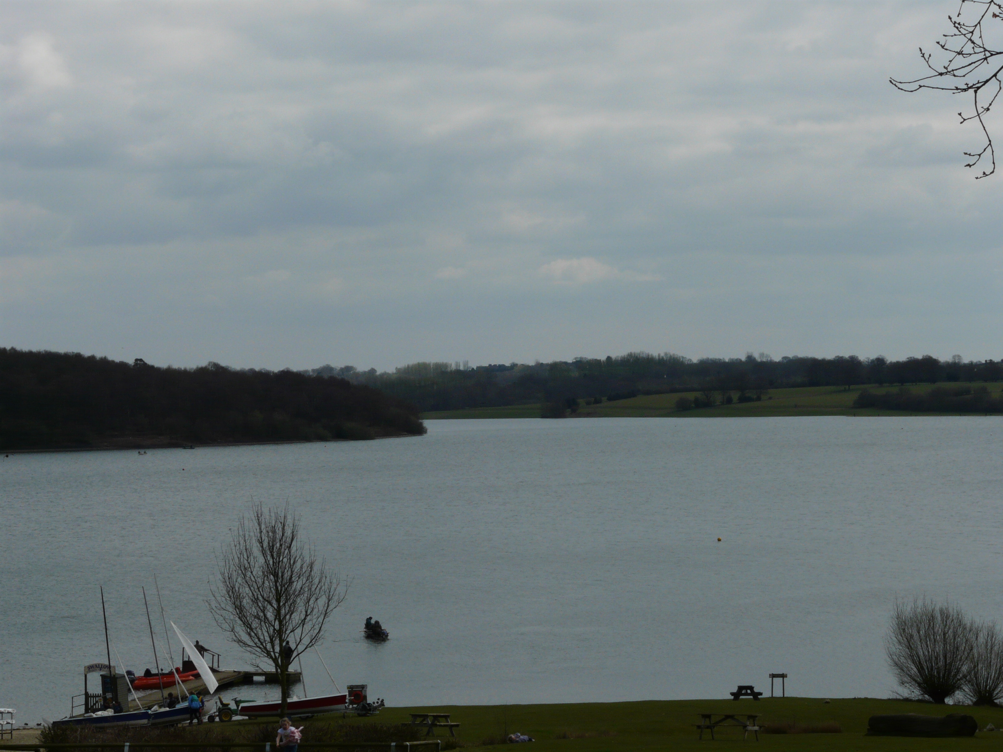 Bewl Water Reservoir, Kent